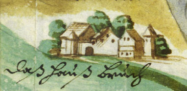 Haus Bruch in der Gemeinde Kirchhundem, NRW, Deutschland